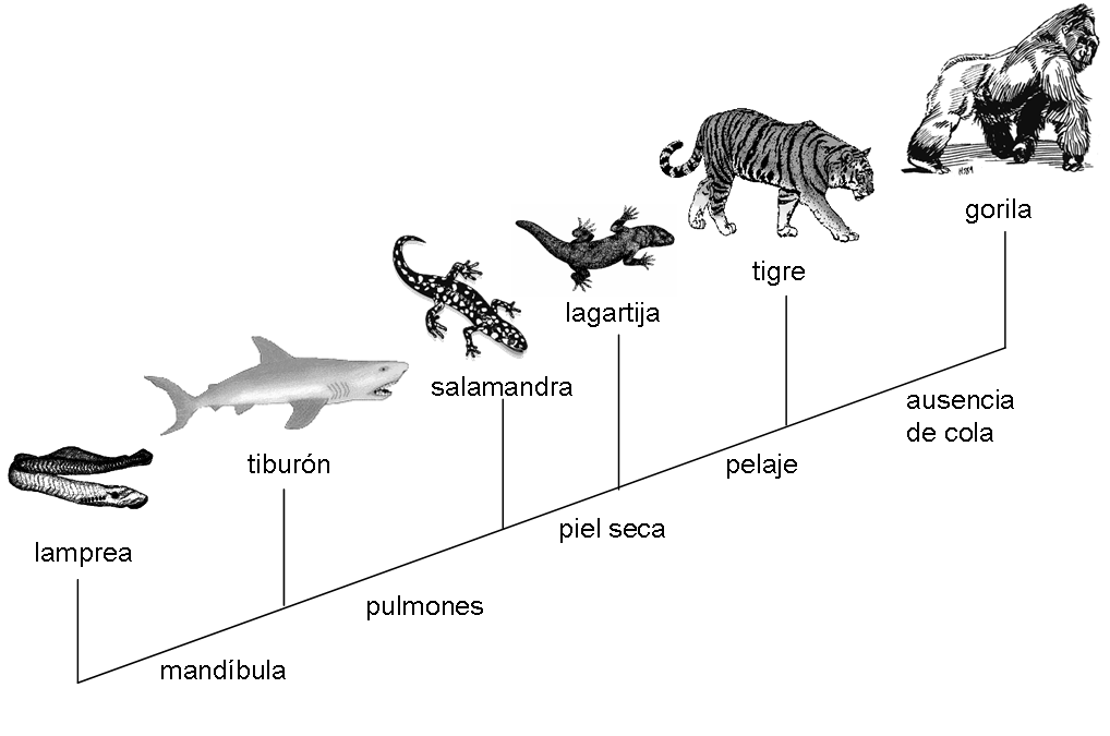 Pequeño ejemplo de cladograma de distintas especies terrícolas. Disponible para iniciar un artículo sobre cladística.